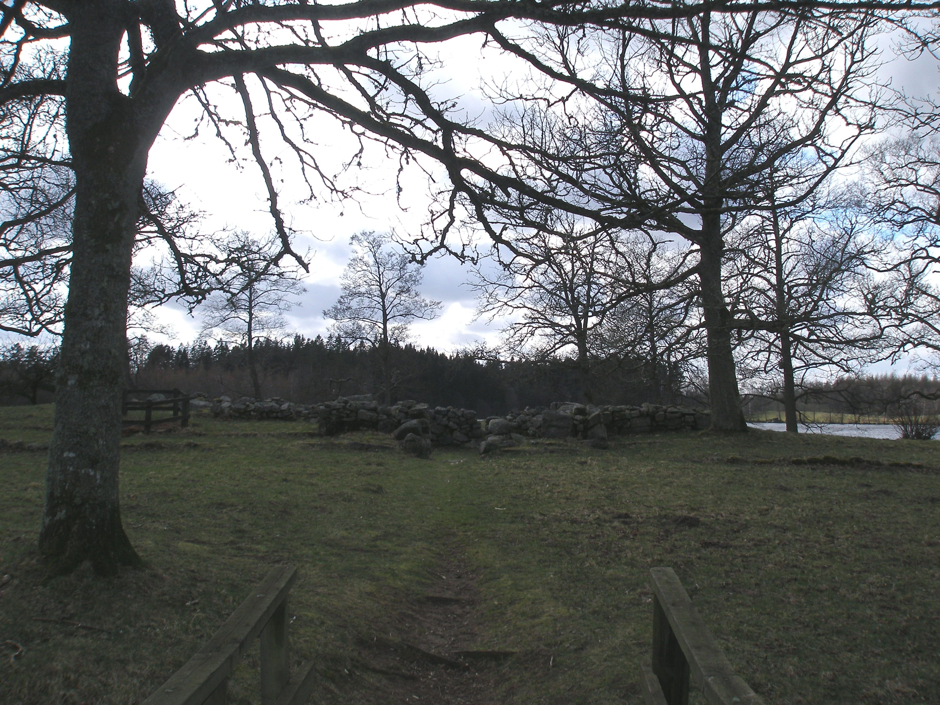 Bild av huvudgården vid Sjöboholm slottsruin (RAÄ-nr Hishult 77:1) på en udde i Oxhultasjön, Hishults socken, Höks härad, Laholms kommun, Halland, Hallands län, Sverige.